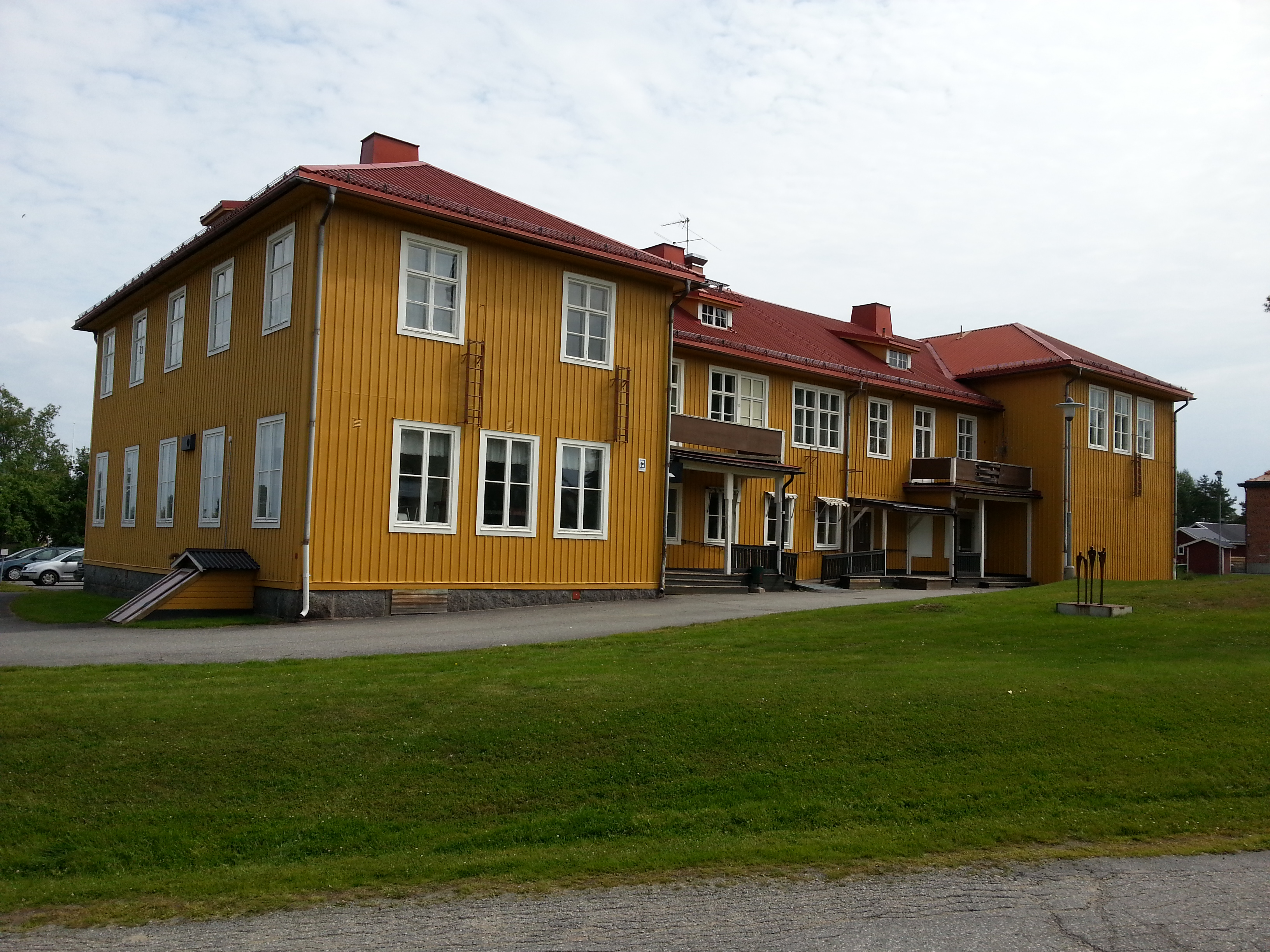 Rundvik, Nordmaling, Sverige. Gamla skolan fotograferad från Skolgatan, på Rundviksdagen 13 juli 2013.